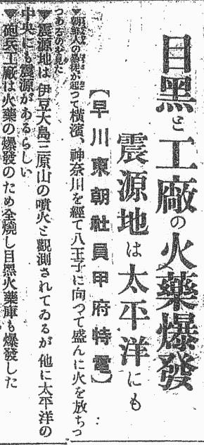 Osaka-Asahi Shinbun (September 3, 1923)